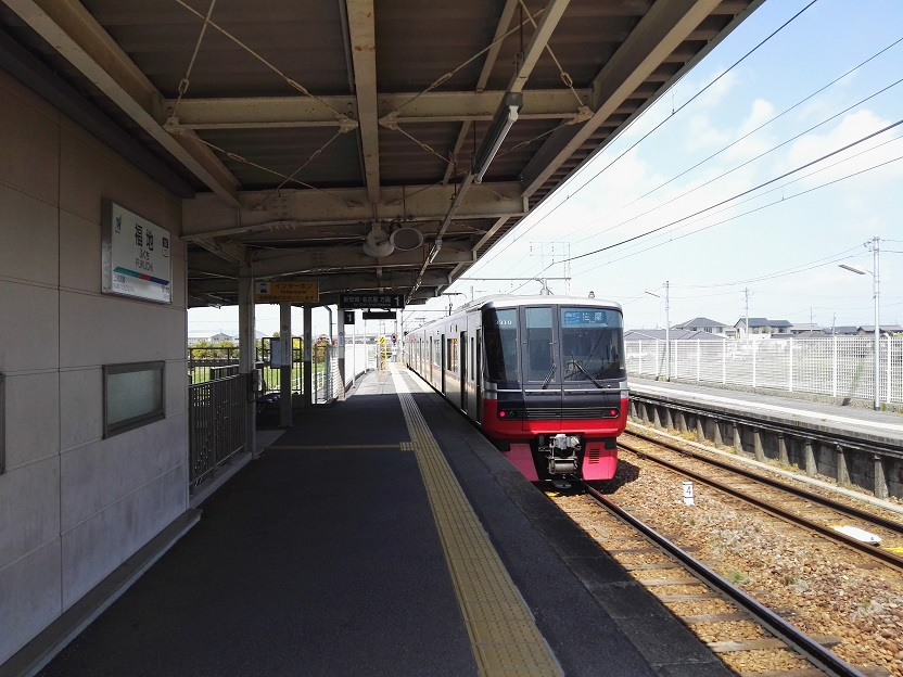 Fukuchi station platform